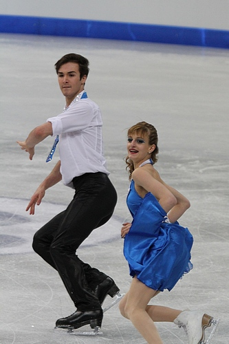 Габриэла Пападакис и Гийом Сизерон (Франция) на чемпионате мира по фигурному катанию среди юниоров 2012